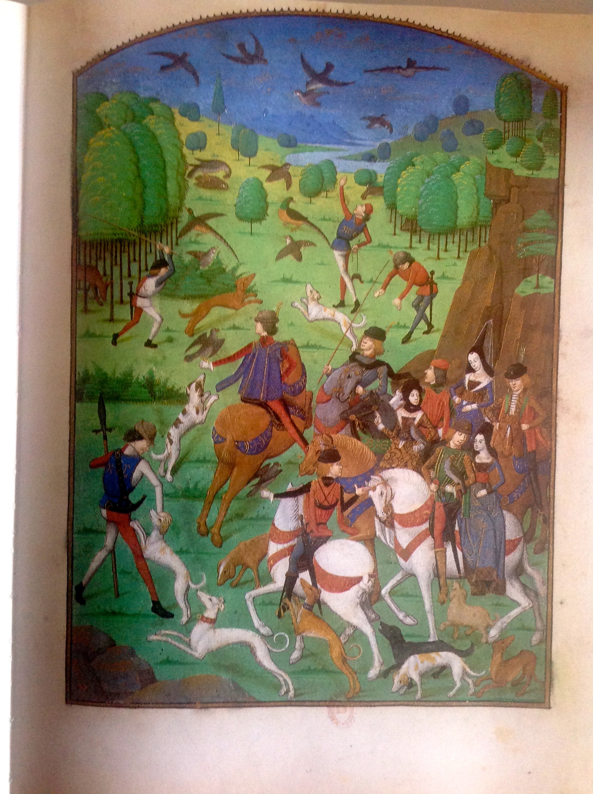 Pierre Choinet - Livre des trois ages